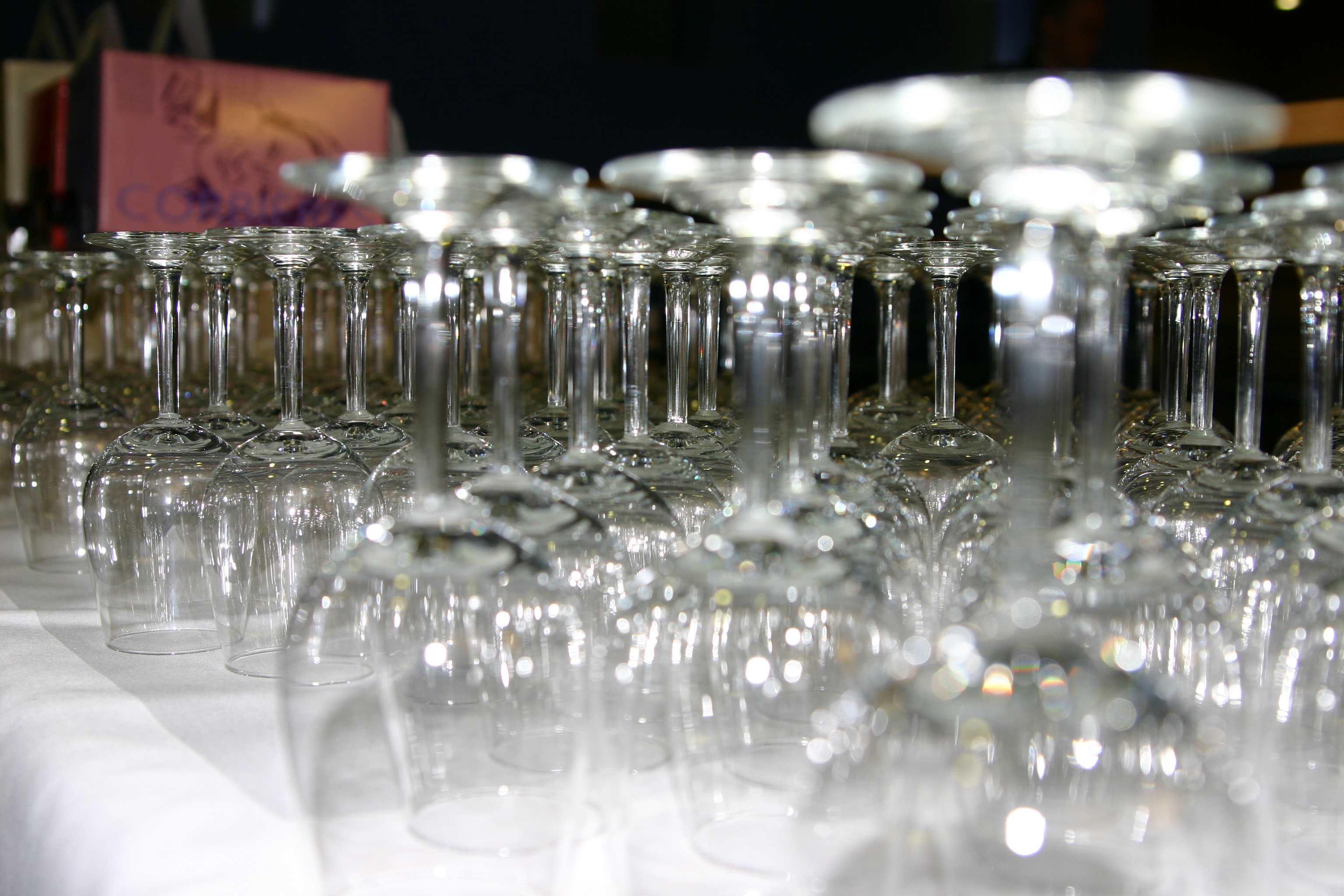 04.03.2006 18:53:17 3072 x 2048 by Marco Gubka Canon EOS 300D